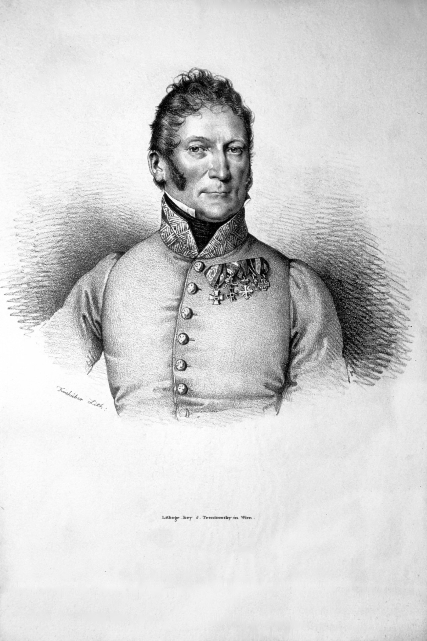 Johann O'Brien (1775-1830), österreichischer General, Ritter des Maria-Theresien-Ordens Lithographie von Josef Kriehuber, um 1830